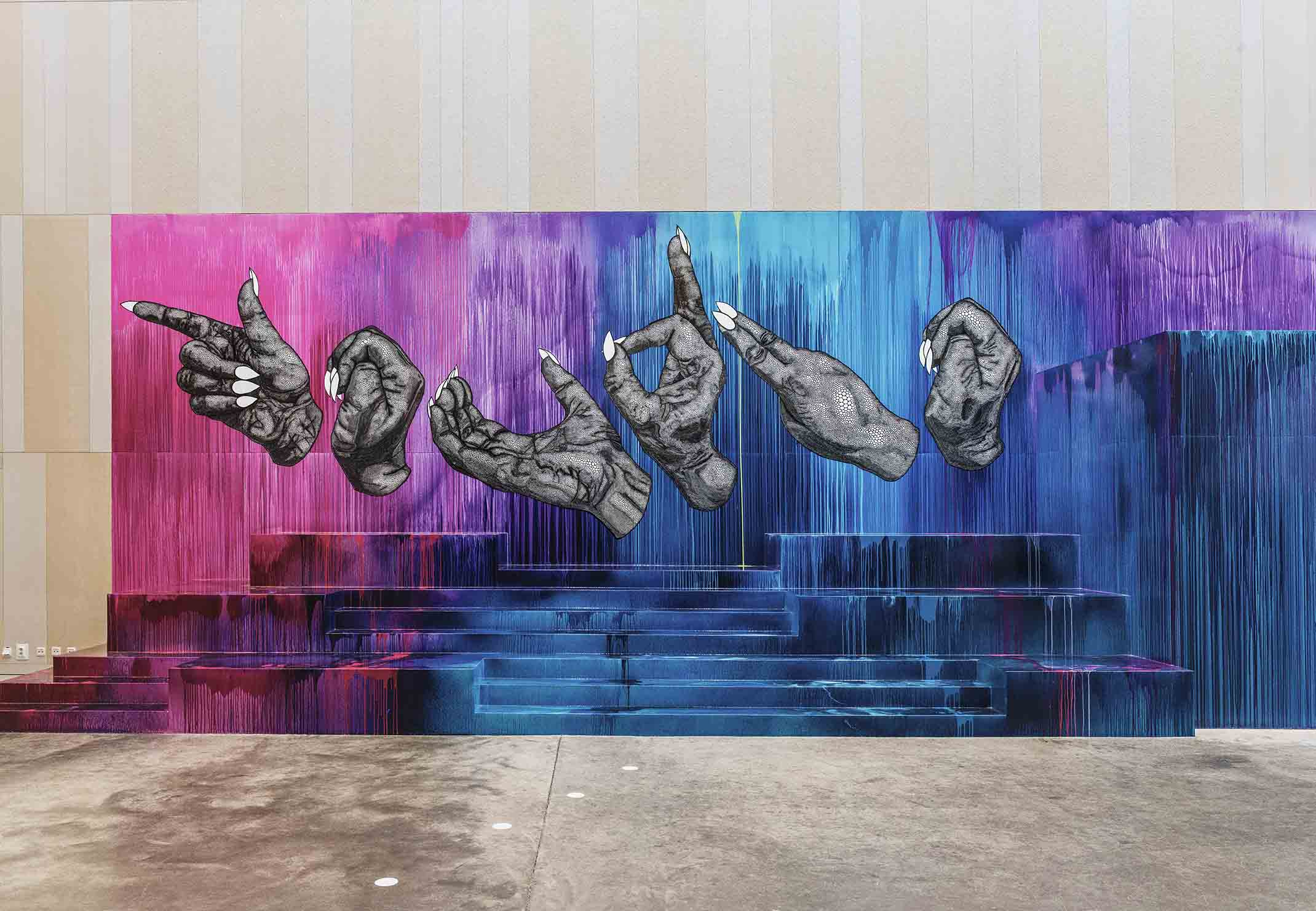 Händerna formar i teckenspråk det gammalgrekiska ordet ”techne” som betyder konst, hantverk och skapande. Målningen fortsätter på en trappa, som kan användas som sittplats eller scen.